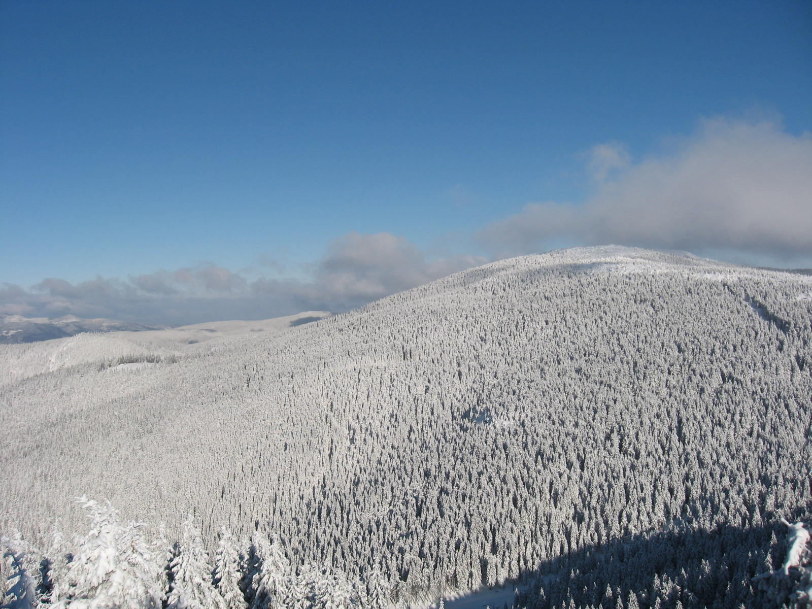 Madarasi-Hargita (RO)